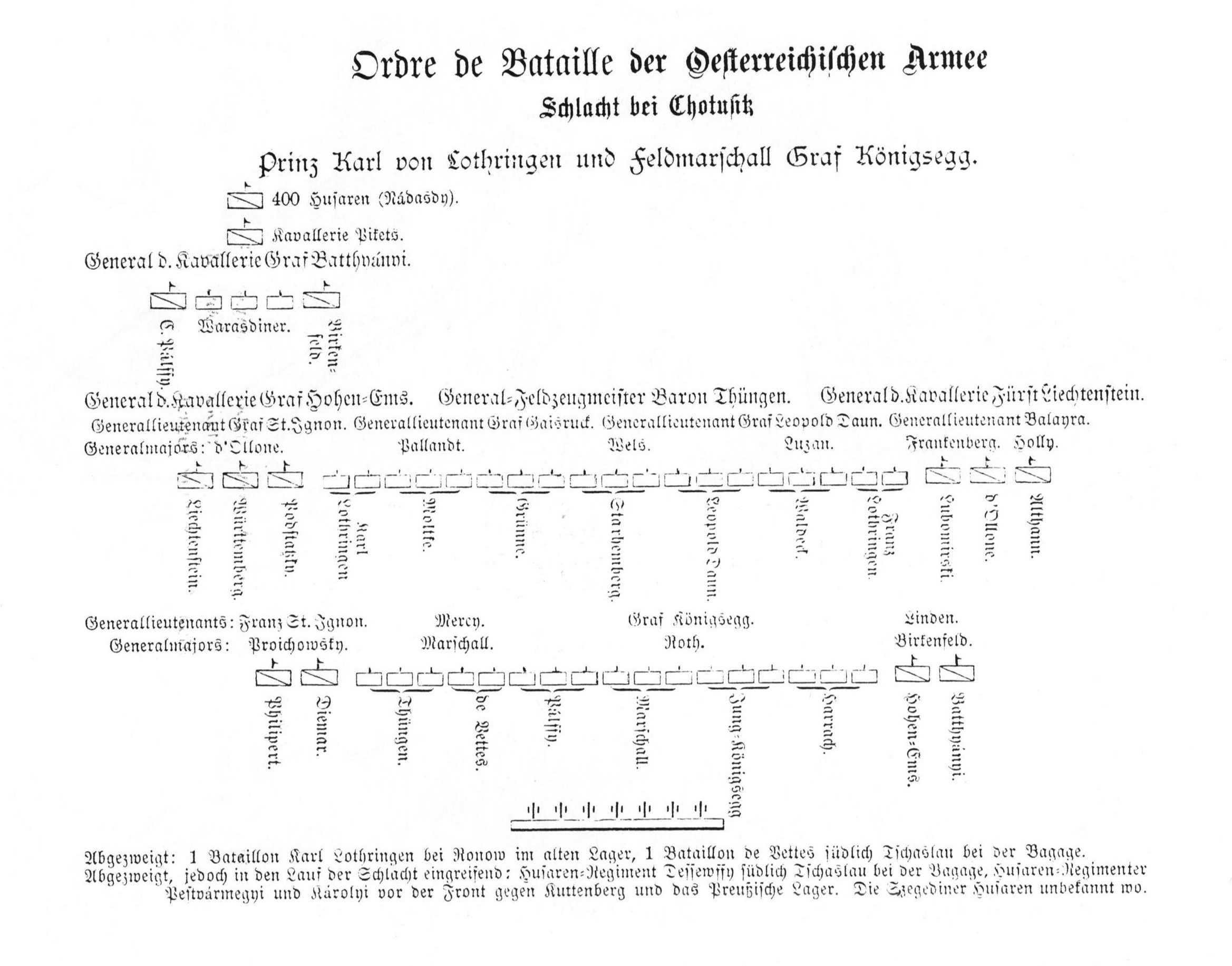 Schlacht bei Chotusitz, Ordre de Bataille, Österreich